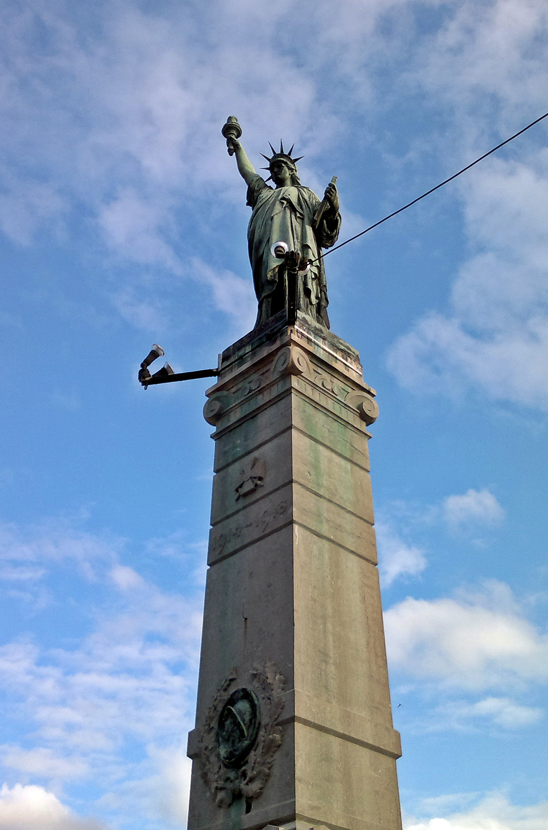 La Commune de Cambrin (dprt du Pas-de-Calais)